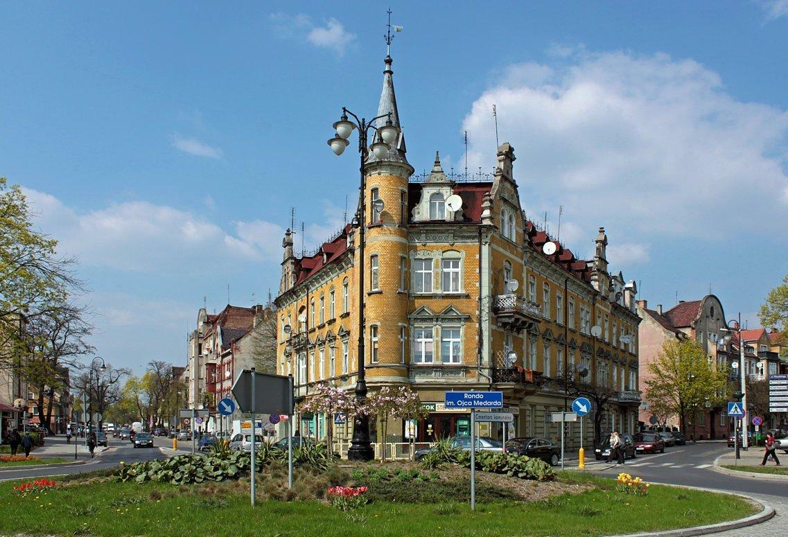 Kamienica przy ul. Wyspiańskiego nr 1 w Nowej Soli, znajdująca się przy rondzie im. Ojca Medarda, gdzie krzyżują się ulice: Piłsudskiego, Wyspiańskiego i Dąbrowskiego. 05.1976.